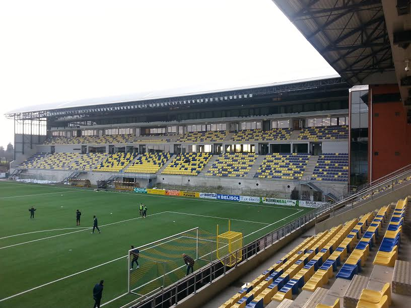 Voetbalstadion van Stvv